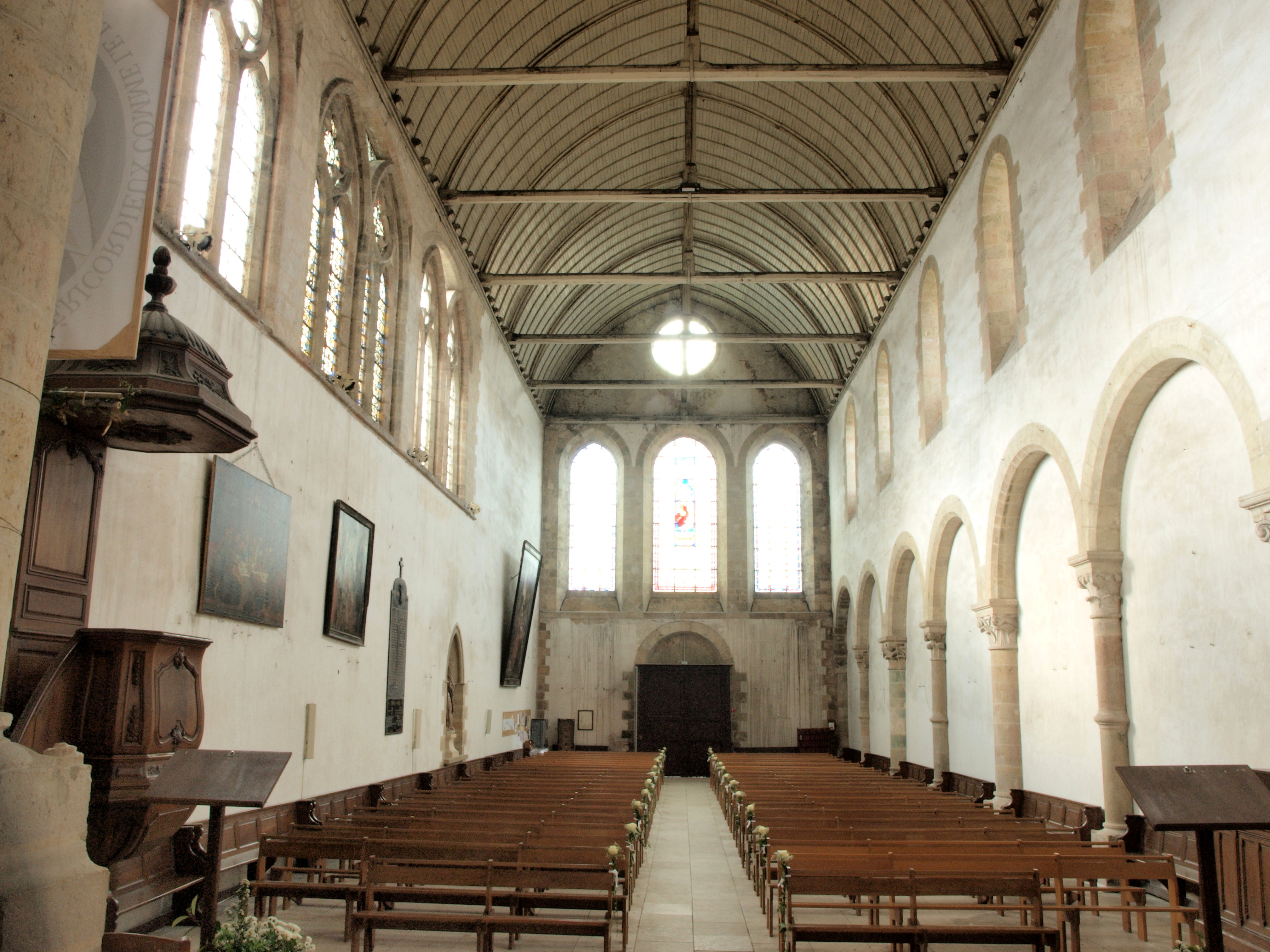 à l'intérieur de l'église abbatiale Saint-Pierre-et-Saint-Paul de Ferrières-en-Gâtinais (Loiret, France)